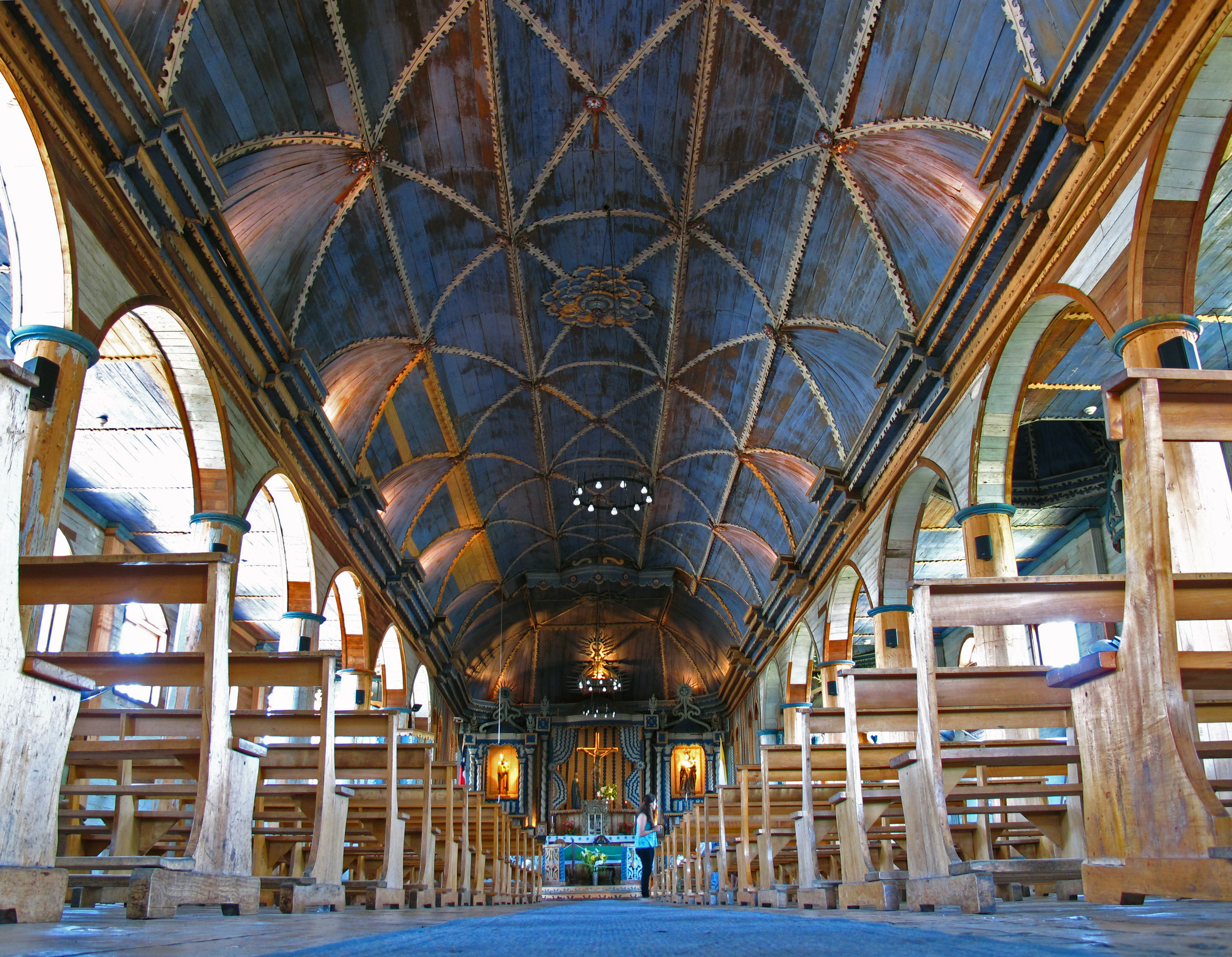 Interior de la Iglesia Nuestra Señora de Loreto de Achao, designada Patrimonio de la Humanidad por la Unesco, en el sur de Chile